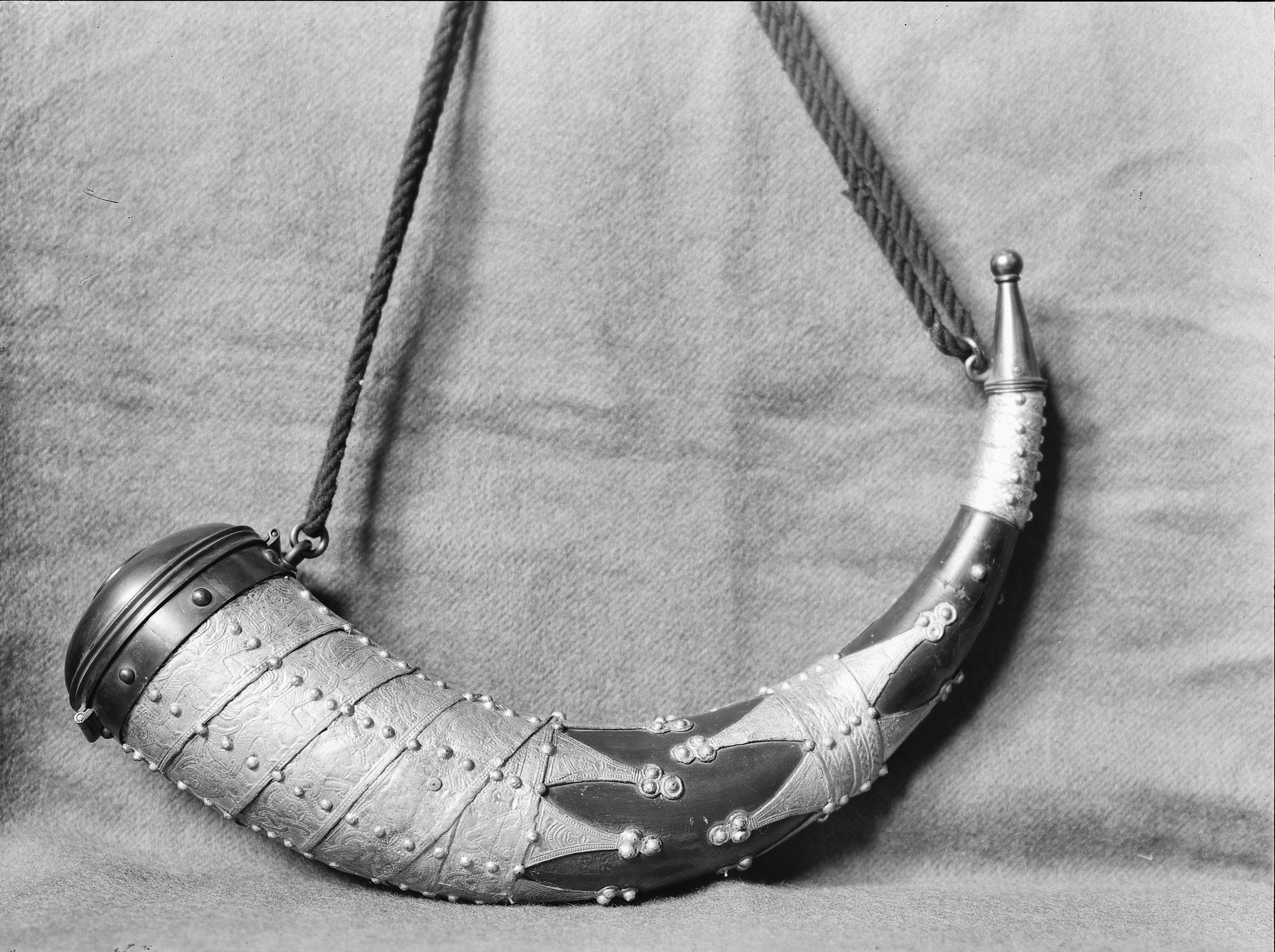 Onze-Lieve-Vrouwekerk: reliekhouder, Scandinavische hoorn met loodzilver beslag.